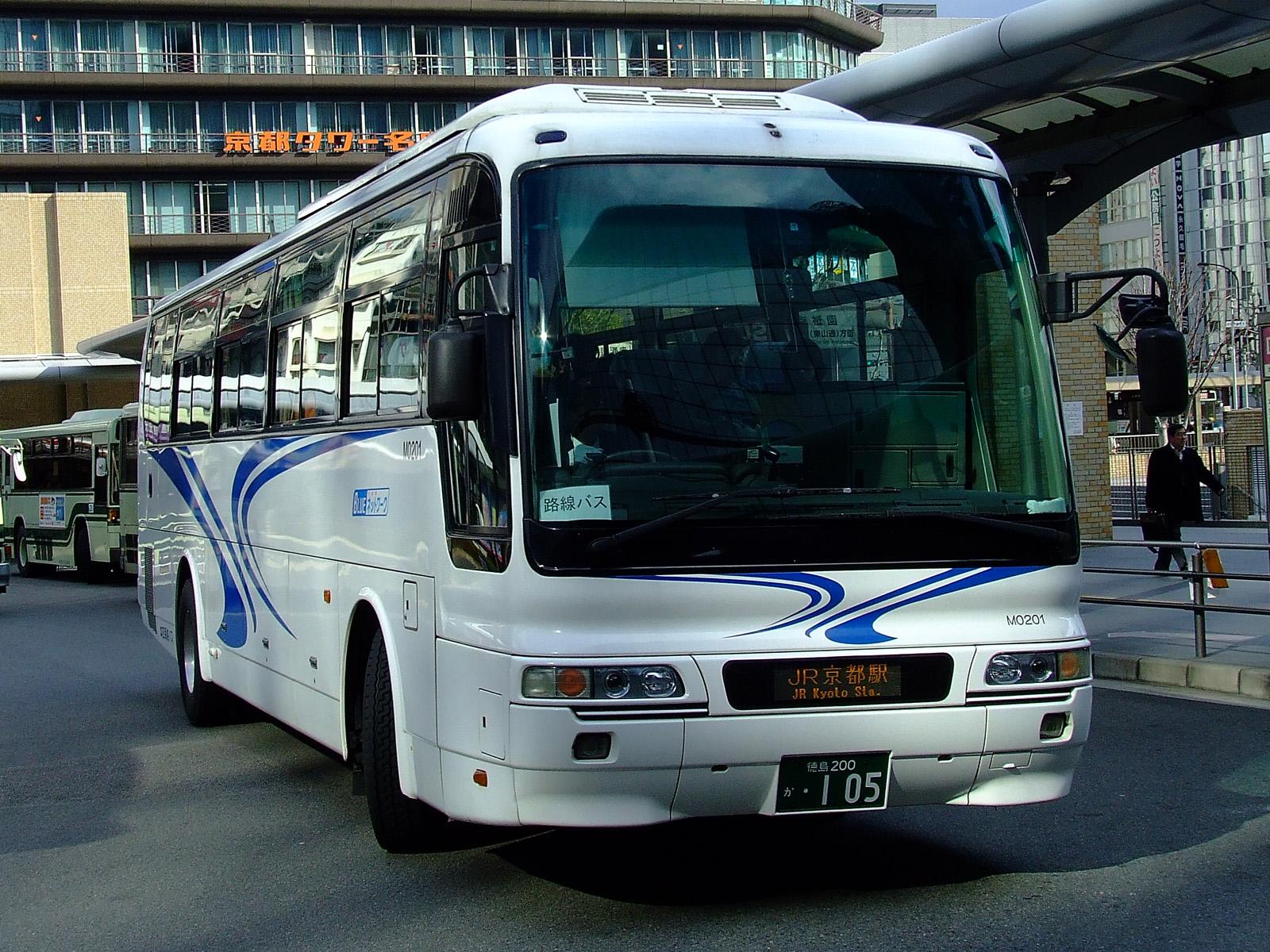 本四海峡バス「阿波エクスプレス号（京都）」JR京都駅烏丸口にて